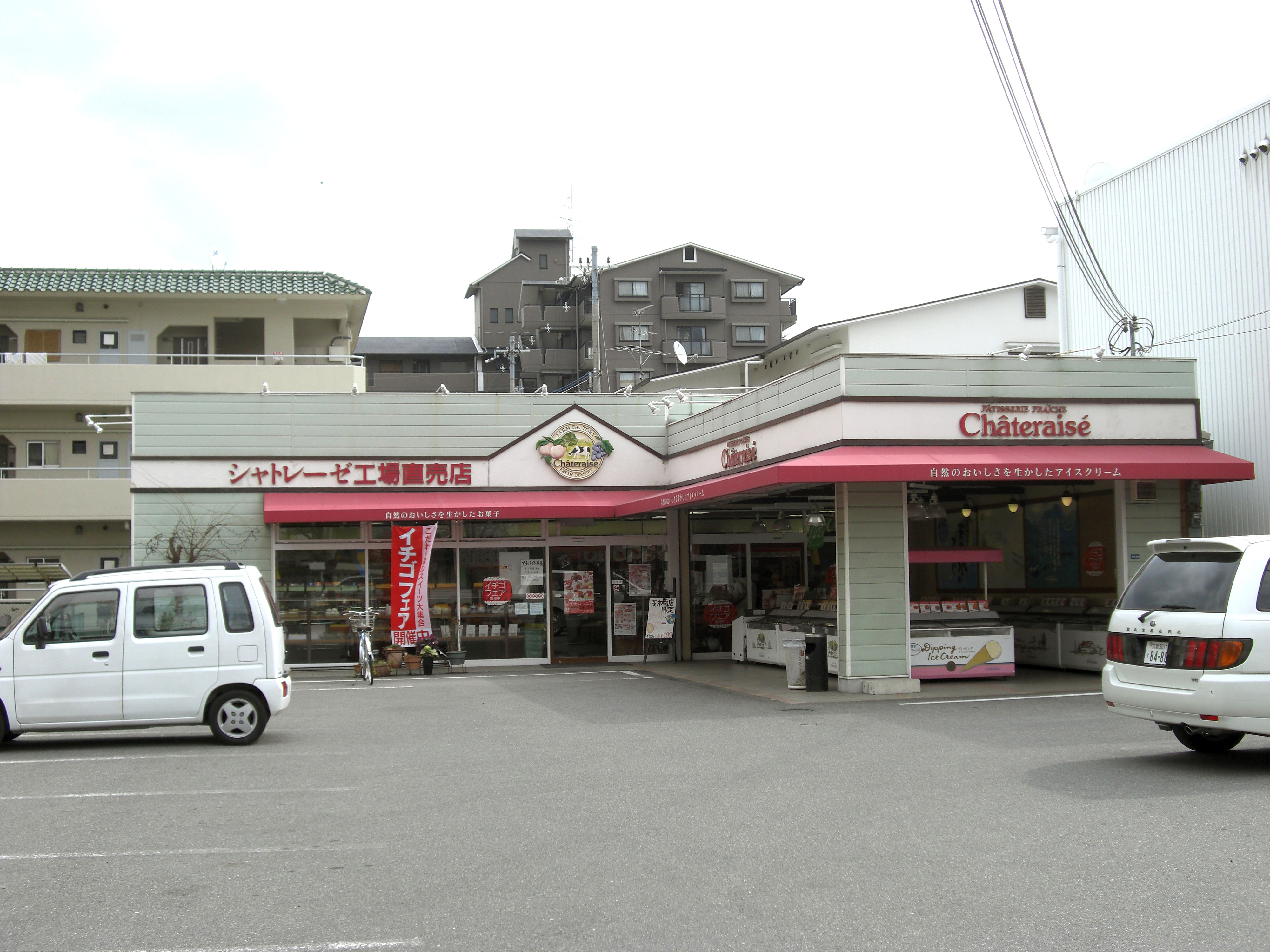 Chateraise Ibaraki-minami,Masago Ibaraki-shi Osaka Japan.